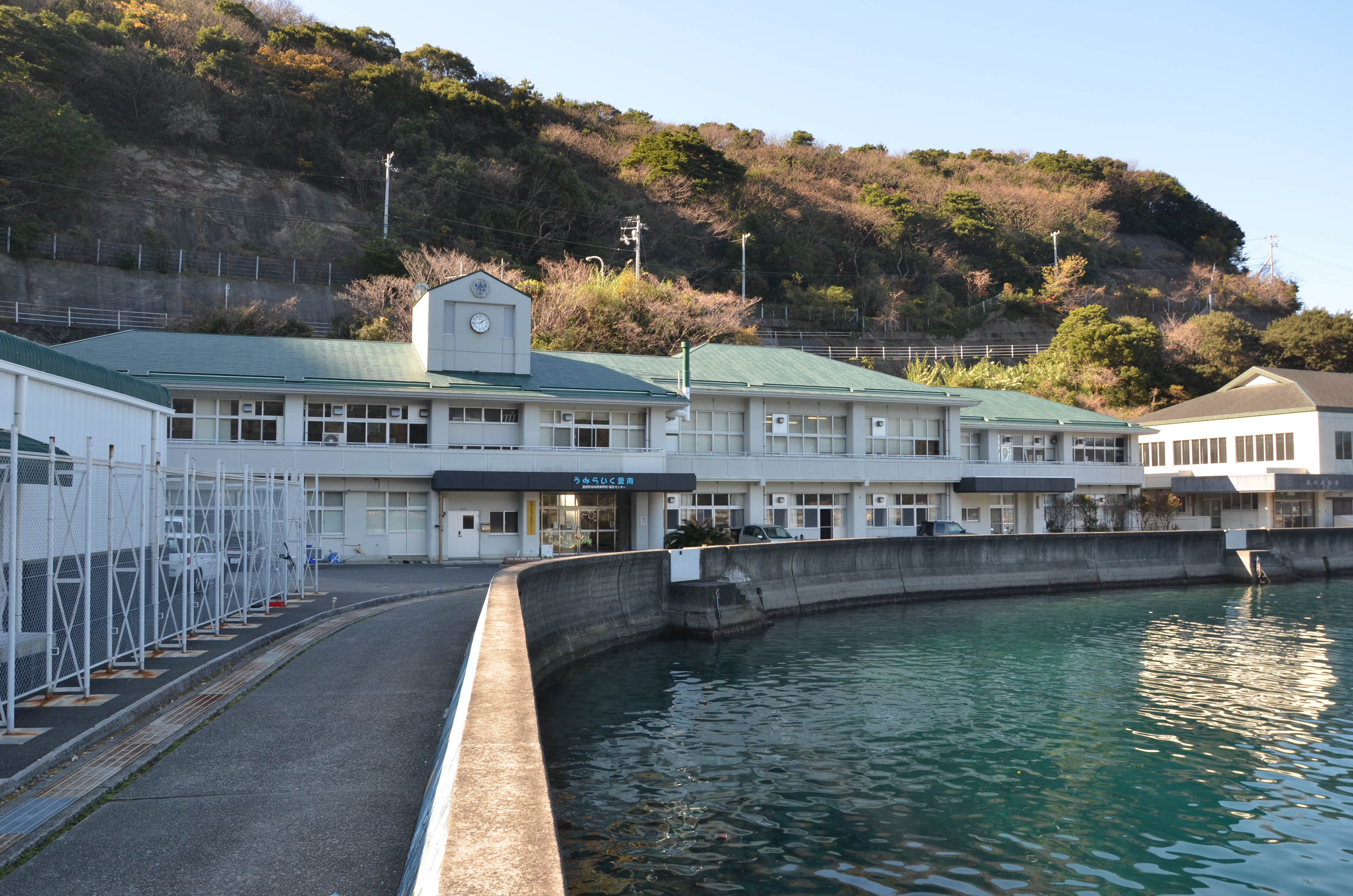 西浦ステーションの外観